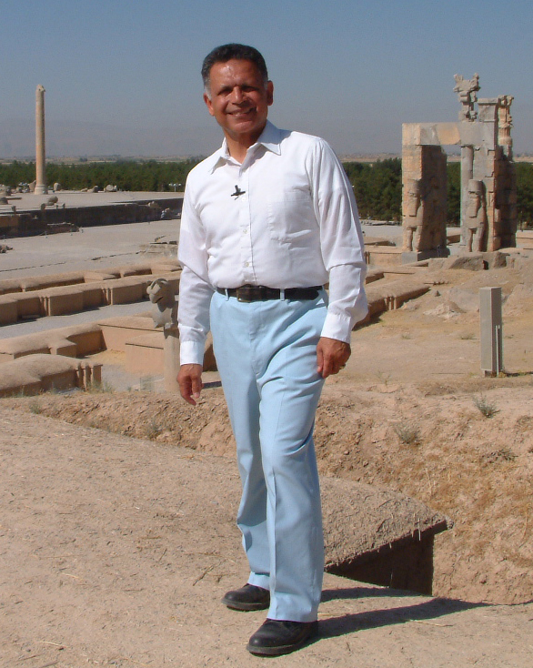 علیرضا شاپور شهبازی در تخت جمشید